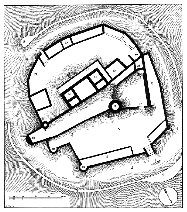 Helfenburk – půdorys hradu od Baltazara Kutiny publikovaný roku 1890; Popis: 1 – val, 2 – svahy, 3 – bašta, 4 – bašta, 5 – příkop, 7 – první brána, 8 – předhradí, 9 – hospodářská budova, 10 – bašty, 11 – cisterna, 12 – druhá brána, 13 – parkán, 14 – bergfrit, 15 – bašta, 16 – třetí brána, 17 – čtvrtá brána, 18 – budova, 19 – hospodářské budovy, 20 – branka do příkopu, 21 – mlýn, 22 – věž, 23 – hradba paláce, 24 – paláce